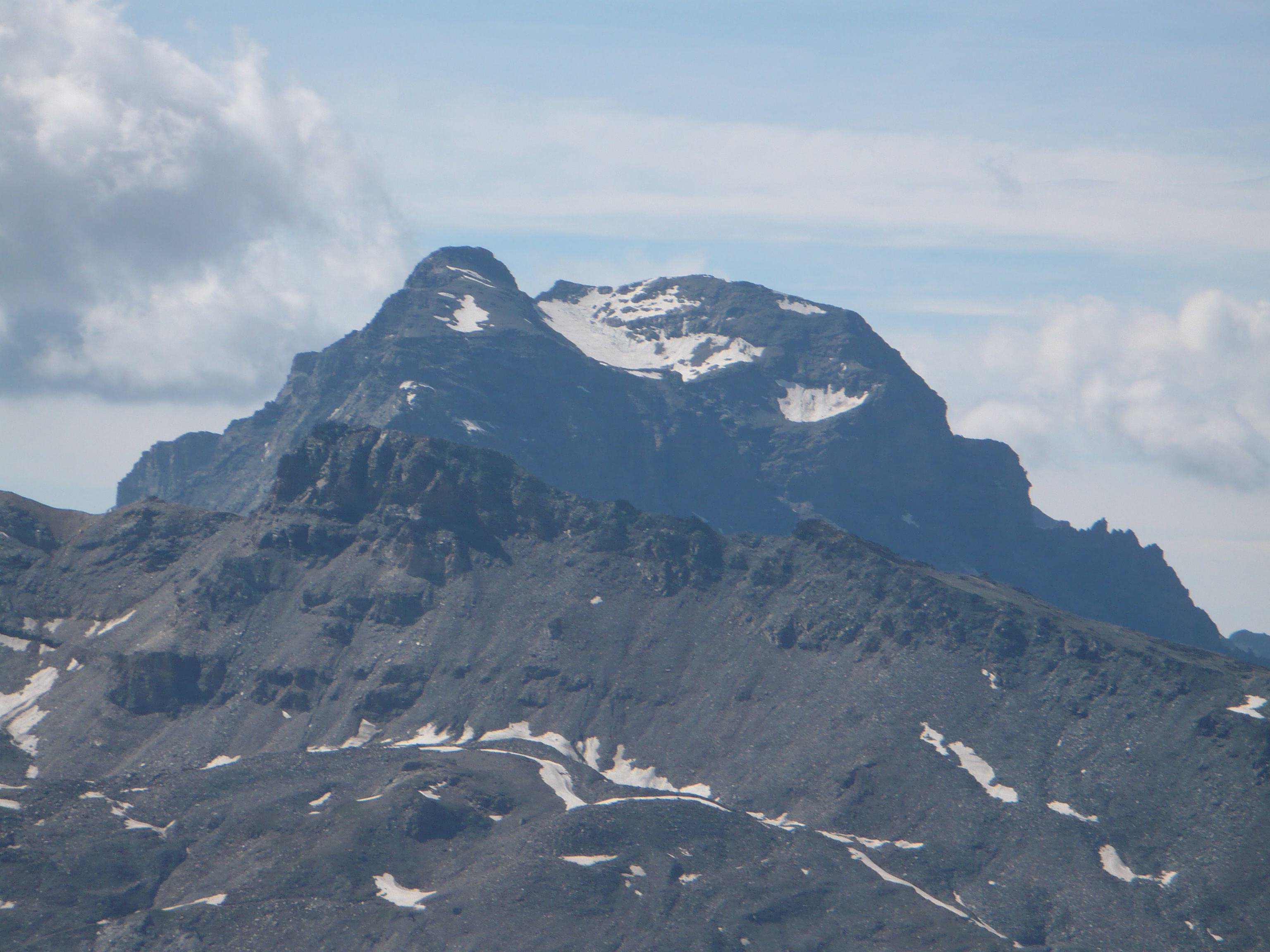 Il monte Roisetta in Valle d'Aosta nelle Alpi Pennine